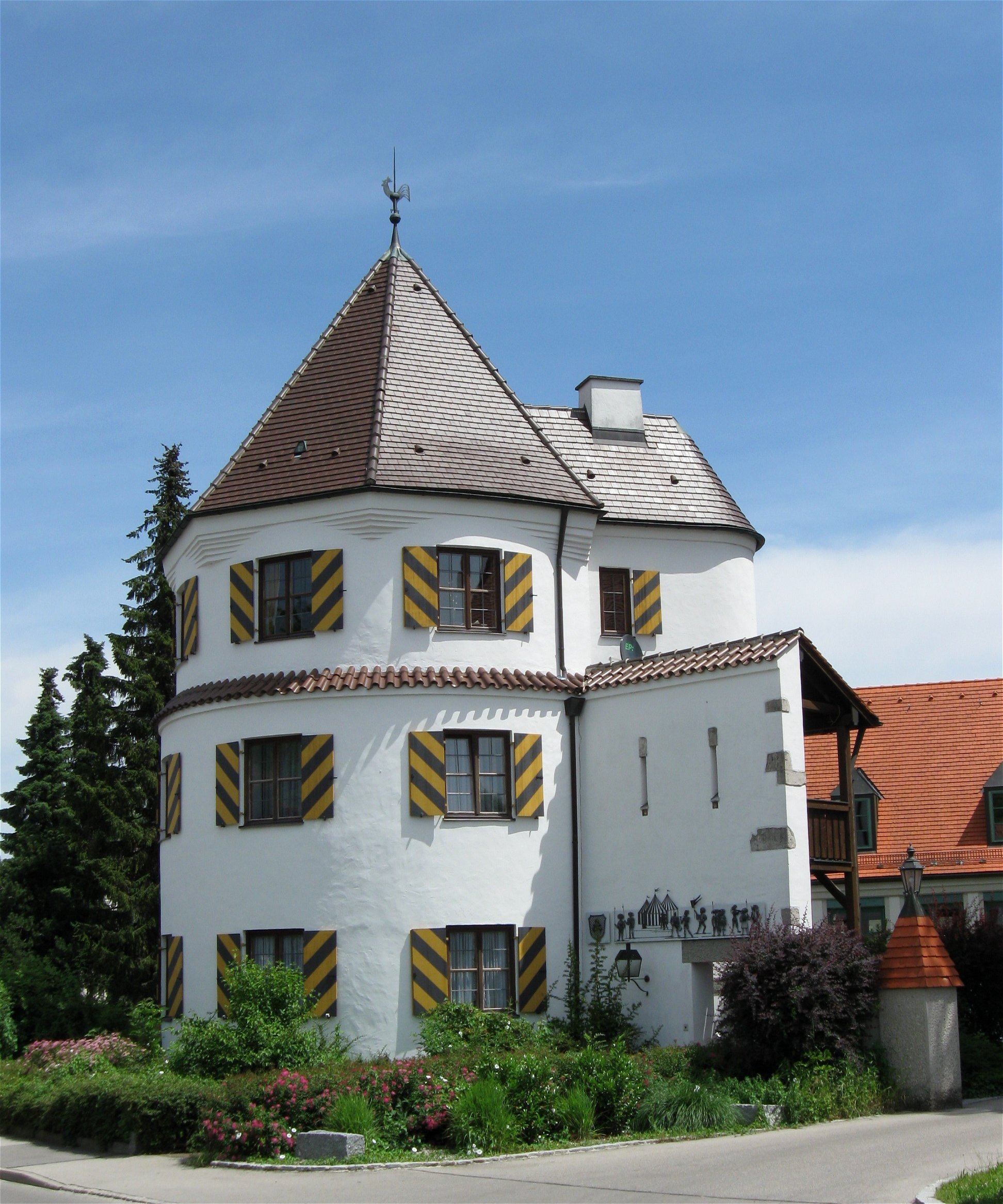 Hermelestraße 8; Kollegturm, ehem. Eckturm, sog. Kollegturm, dreigeschossiger, runder Bau mit Zeltdach, im Nordwesten, um 1500; Teil der ehem. Stadtbefestigung. D-7-78-173-1